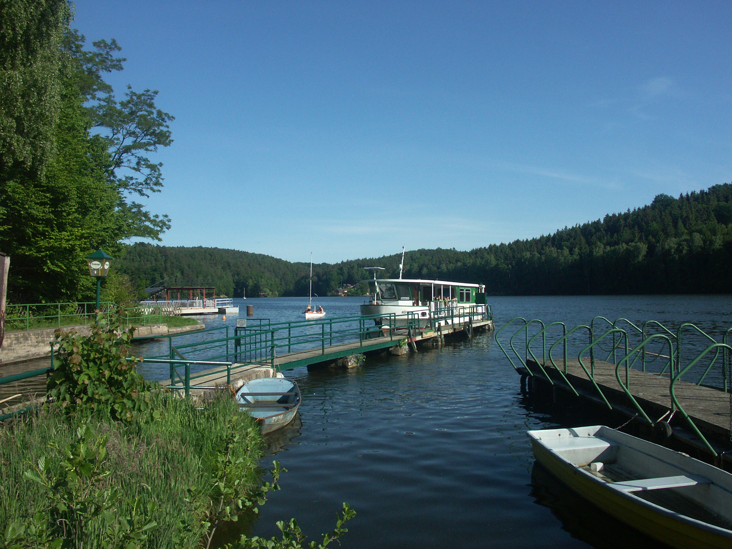 Stausee Kriebstein